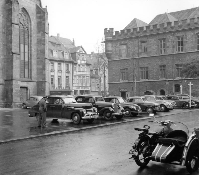 13.10.1953 Göttingen